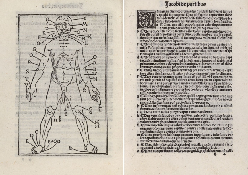 Jacobus de Partibus, "Summula": anatomical diagram and explanatory text, from Articella (Papiae, 1506)